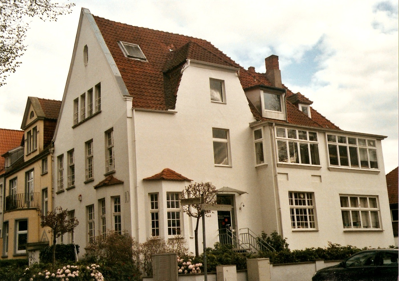 Das einstige Dziobeksche Wohnhaus